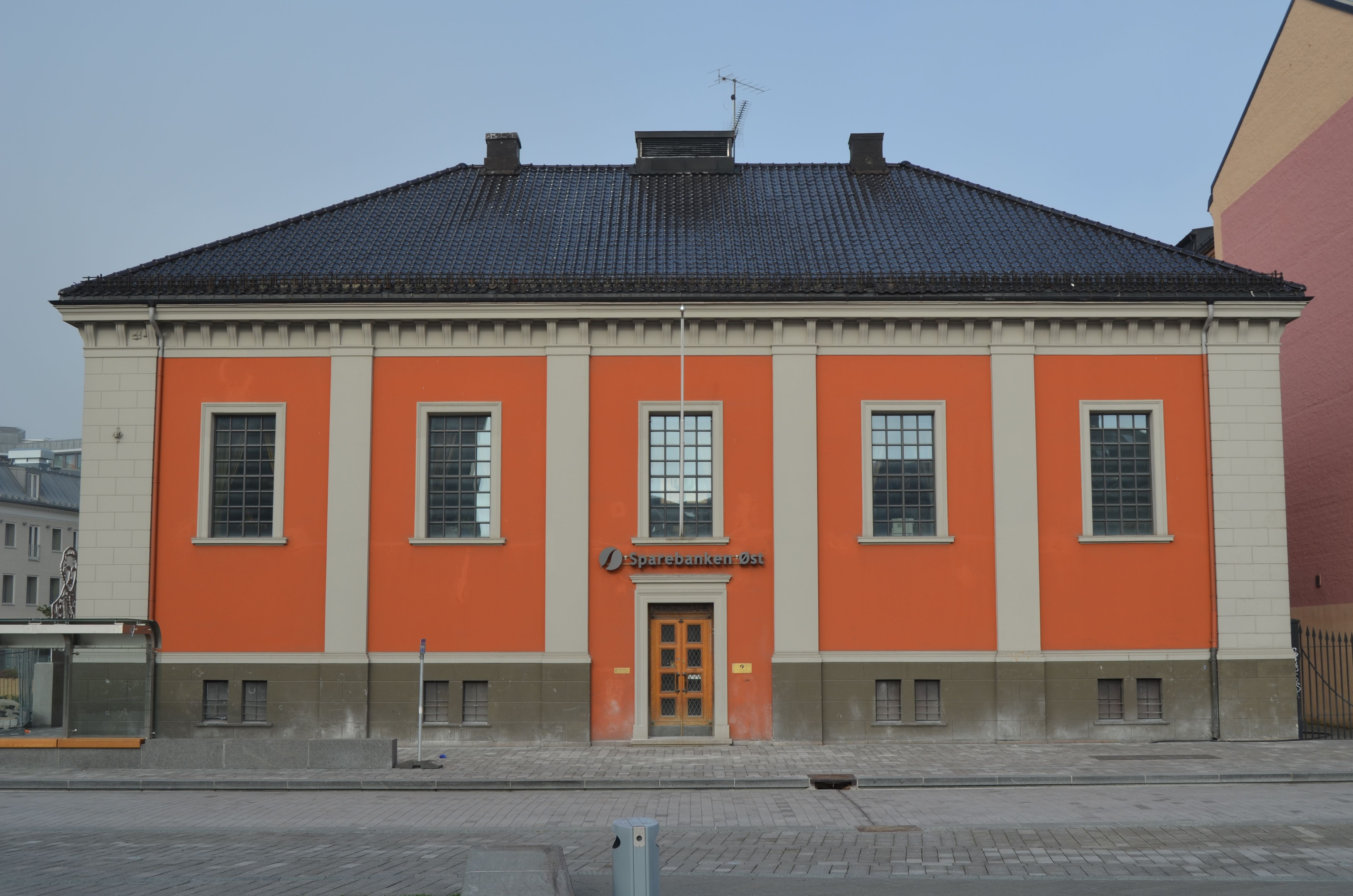 Norges Banks bygning i Drammen bygget 1840-1842. Byggmester Christian Herman Malling.